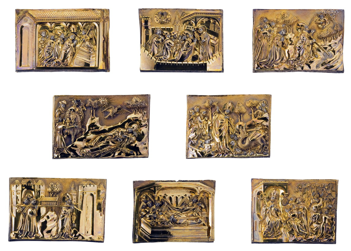 Aus Dankbarkeit für eine Heilung stiftete Herzog Heinrich von Bayern (1386-1450) 1403 der Servatiuskirche in Maastricht eine Reliquienbüste. Sie zeigt den Heiligen Servatius, der 384 als Bischof von Tongern starb. Die acht silbervergoldeten Reliefplatten zierten ursprünglich den achteckigen Sockel der nicht mehr erhaltenen Büste. Mit großer Erzählfreude und realistischer Genauigkeit zeigen die Reliefs Begebenheiten aus der Legende des Heiligen: hier, die Schlüsselübergabe für die Himmelspforte durch Petrus.